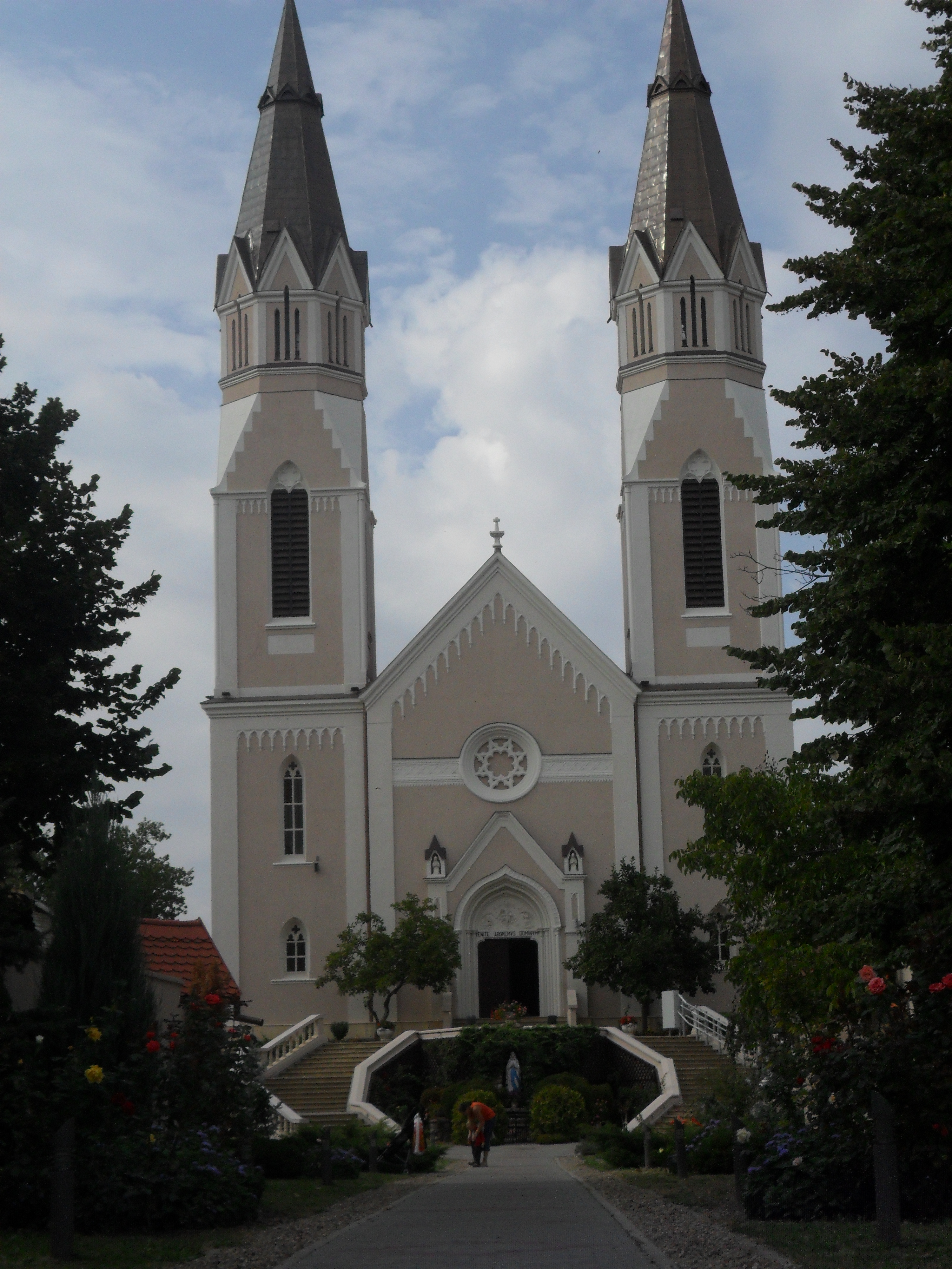 Biserica "Calvaria"